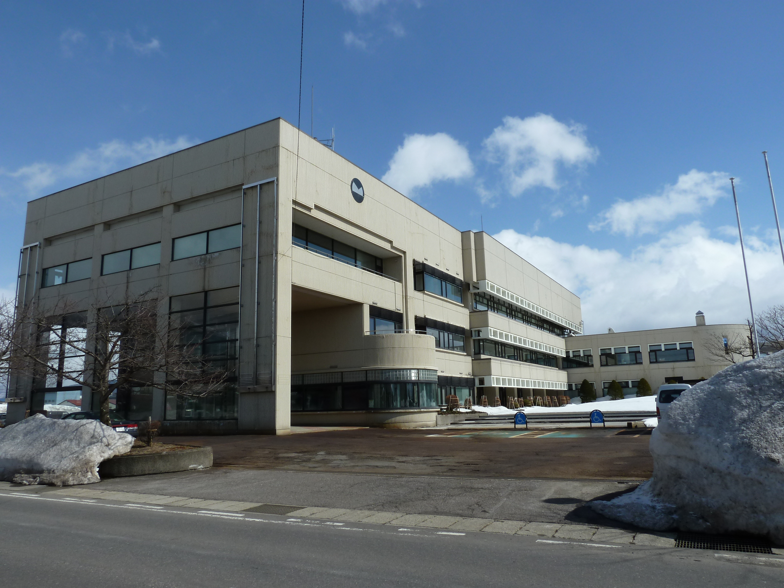 猪苗代町役場